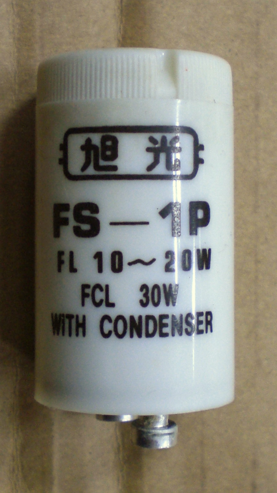 台灣日光燈公司製造的旭光FS-1P安定器